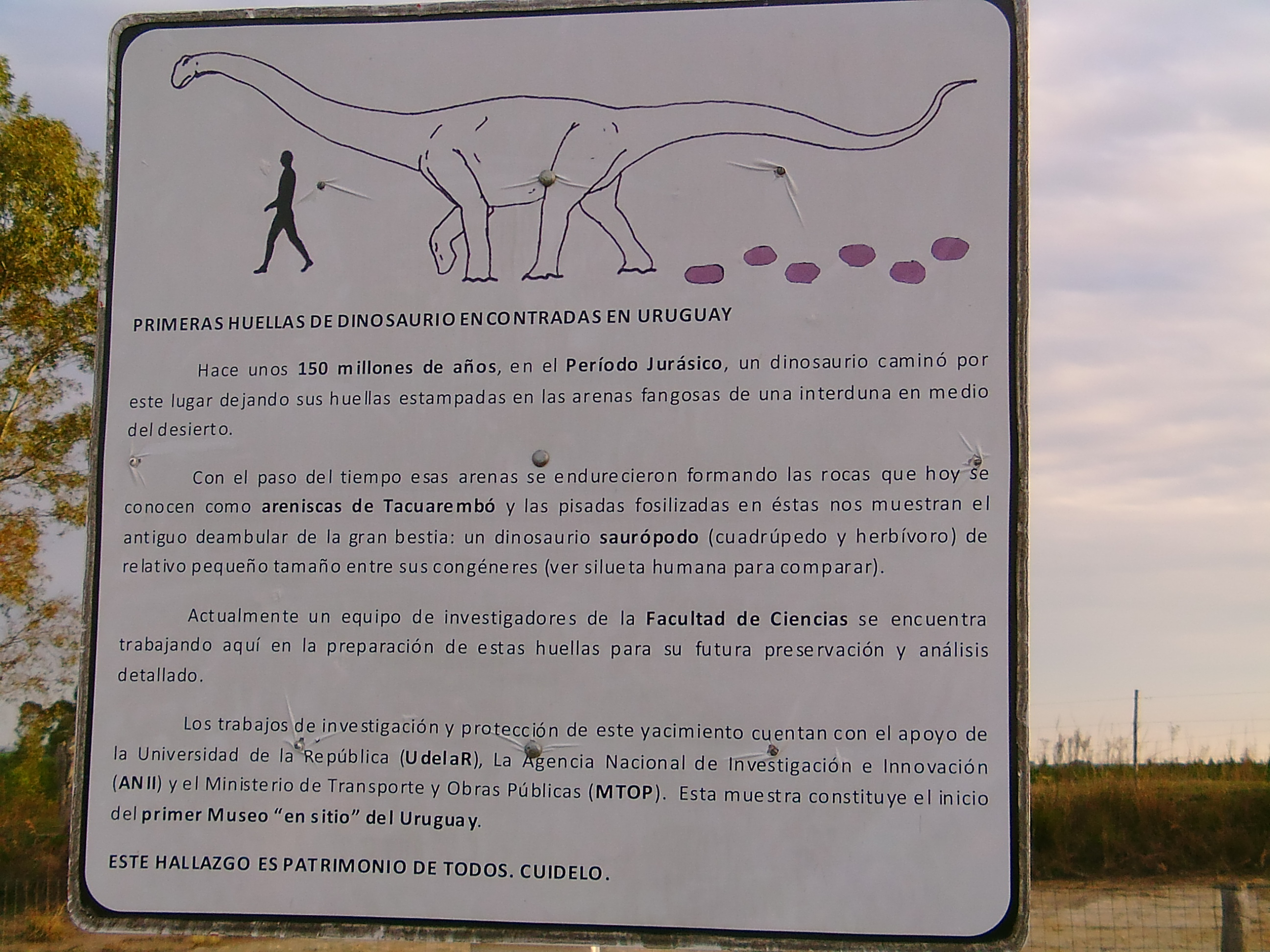 Dinosaurios en Tacuarembó, Uruguay